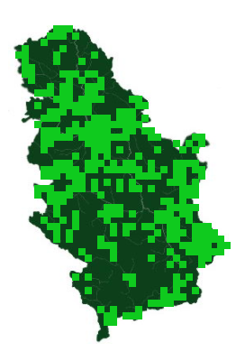 Мапа распрострањена зидног окаша